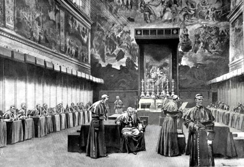 Scrutin lors du conclave de 1903